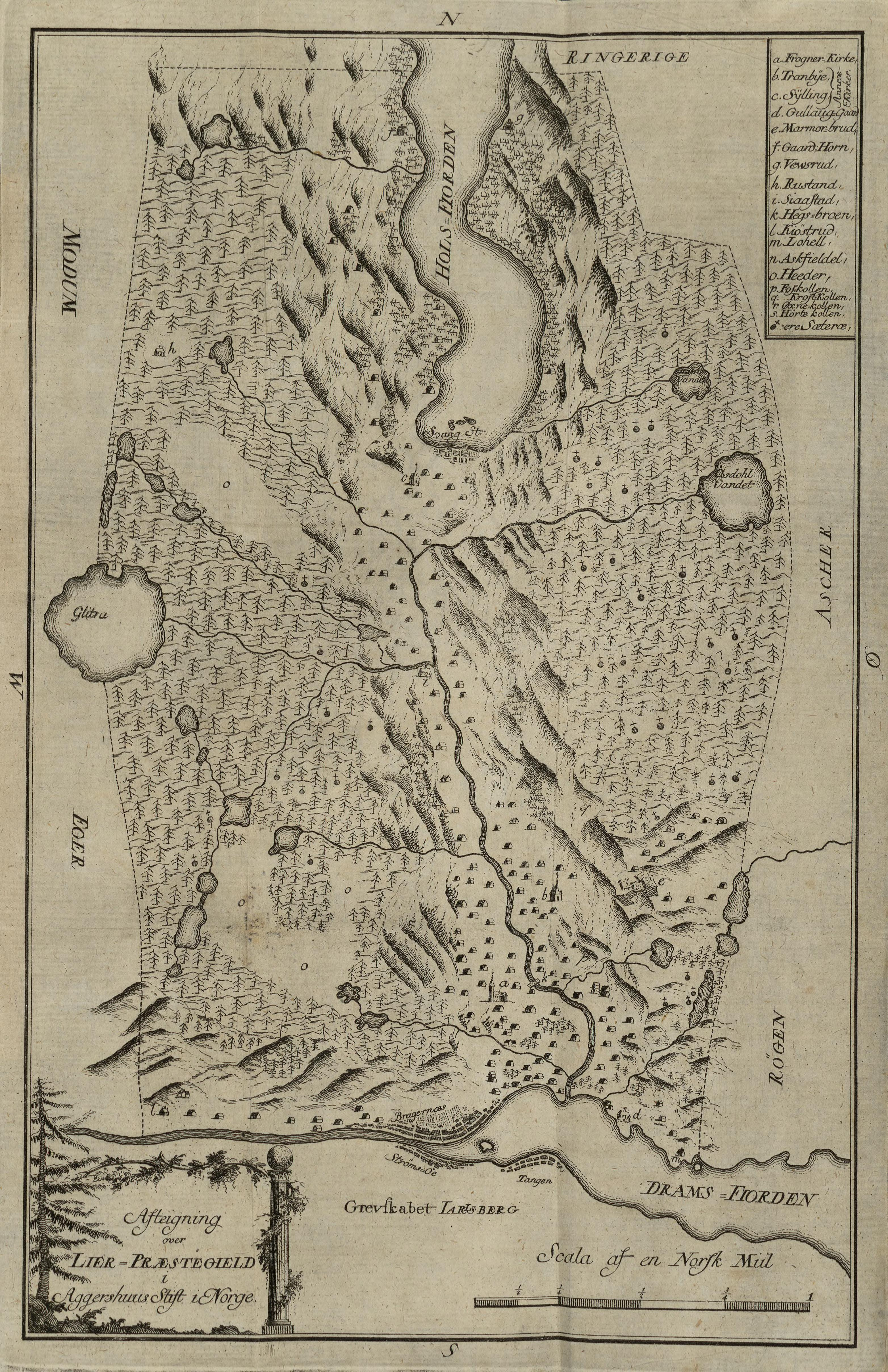 Illustrasjon hentet fra boken "Physisk oeconomisk Beskrivelse over Lier Præstegield i Aggershuus Stift i Norge" av Essendrop, Jens og utgitt av Selges i den Rotheske Boglade paa Børsen (Kiøbenhavn, 1761)